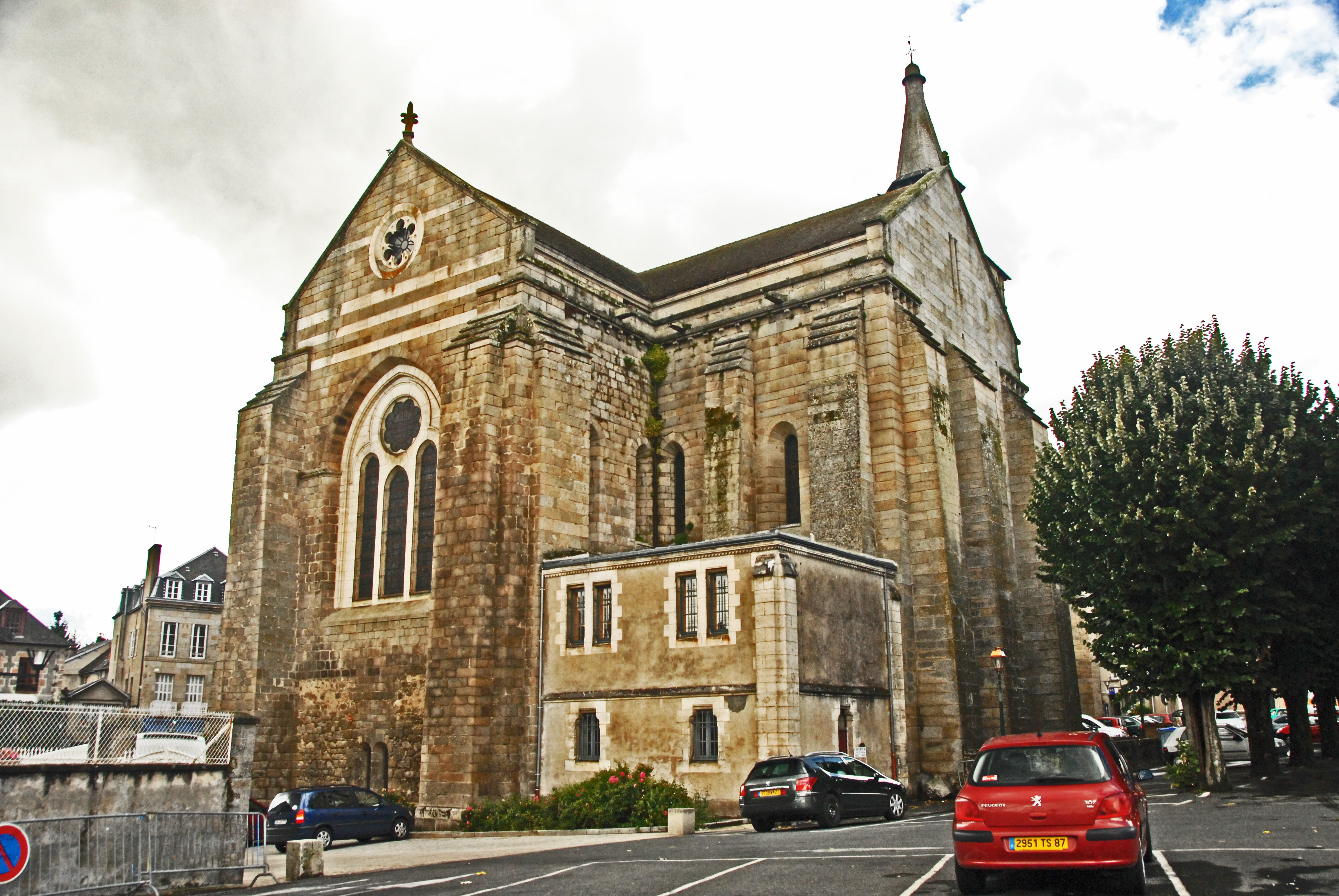 N.-D. de La Souterraine, Chorhaupt von NO